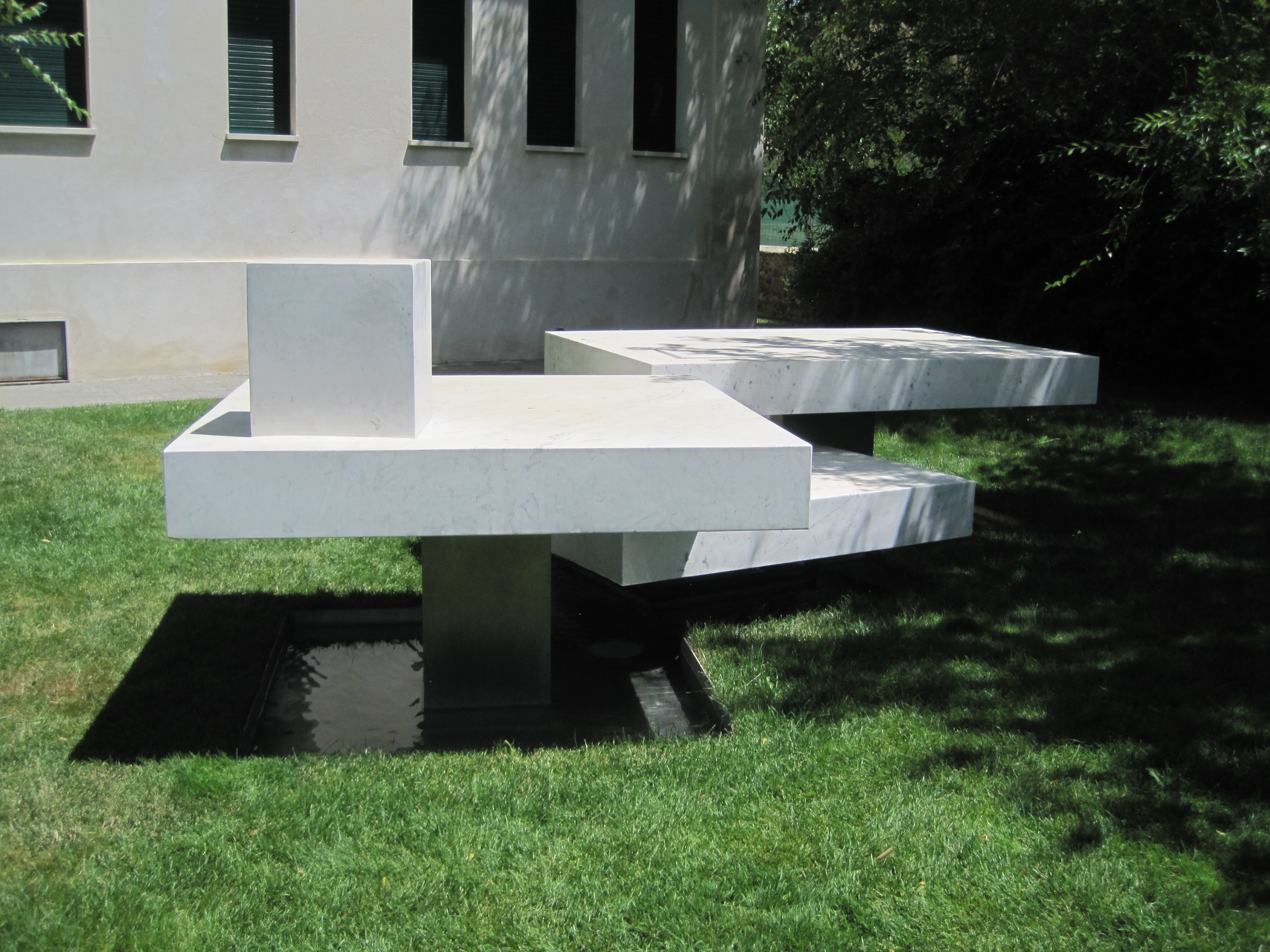 Escultura Murmullo del tiempo (2009), de Tadanori Yamaguchi, en la sede de la Fundación Cerezales Antonino y Cinia (Cerezales del Condado, León, España).